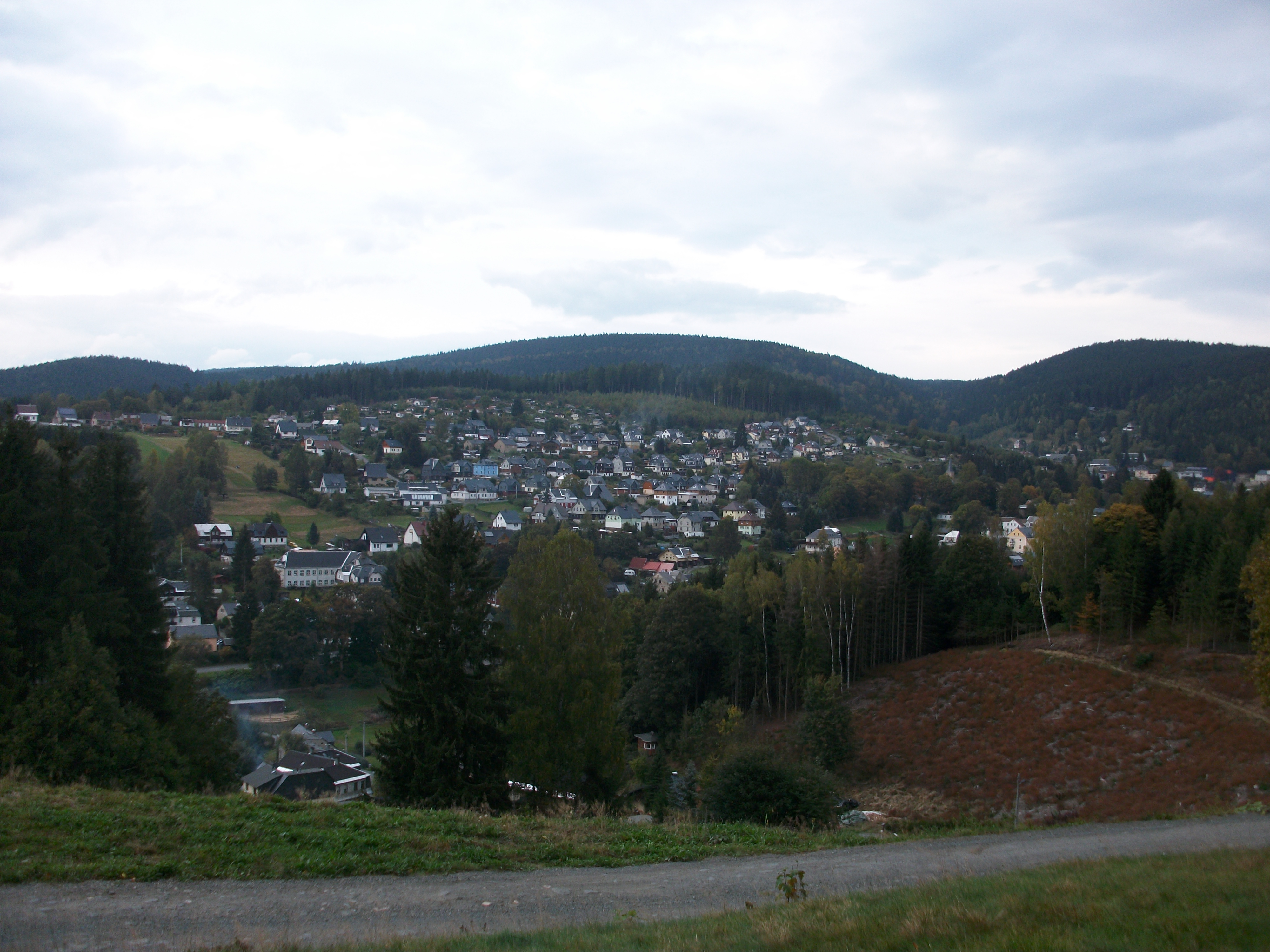 Untersachsenberg